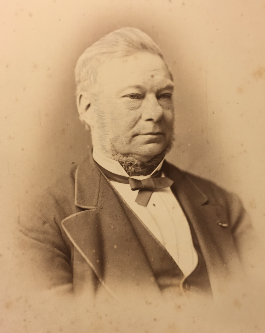 Foto van een oude portretfoto uit eigen Telders familiearchief, Jean Henri Telders geboren 3 juli 1807 en overleden in Badenweiler op 15 augustus 1878, in 1840 getrouwd met J. Vertholen.